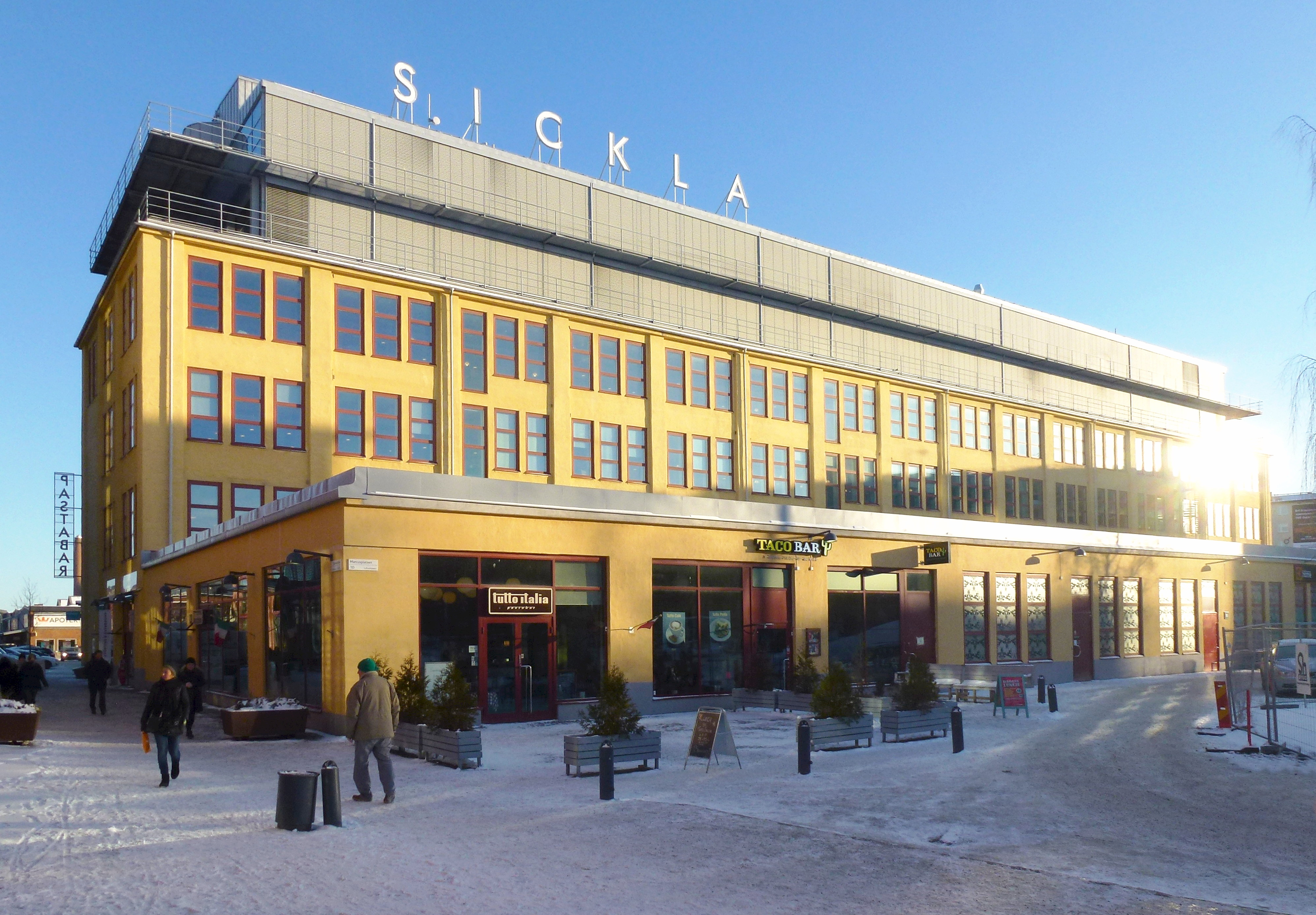 Luftverkstaden